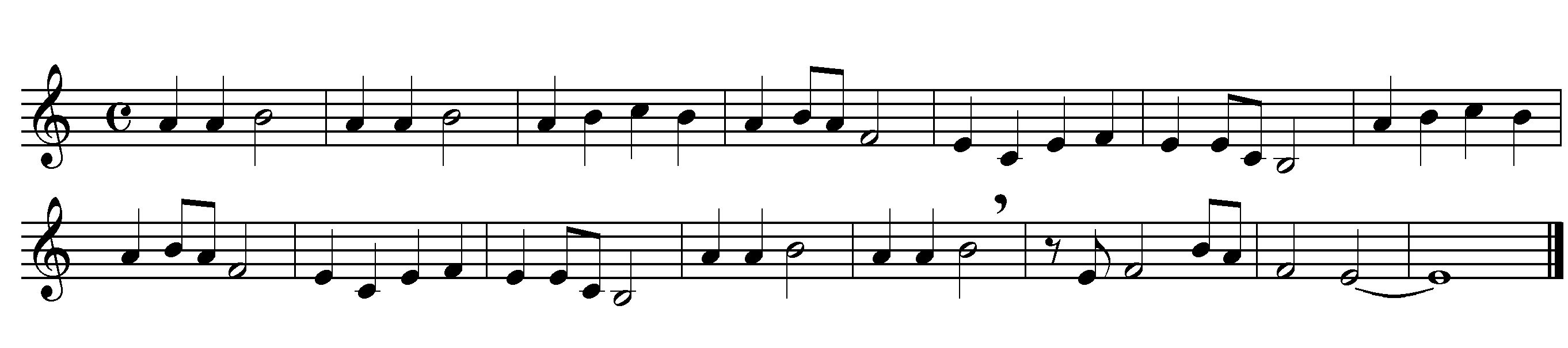 Sakura („Kirschblüte“), japanisches Volkslied